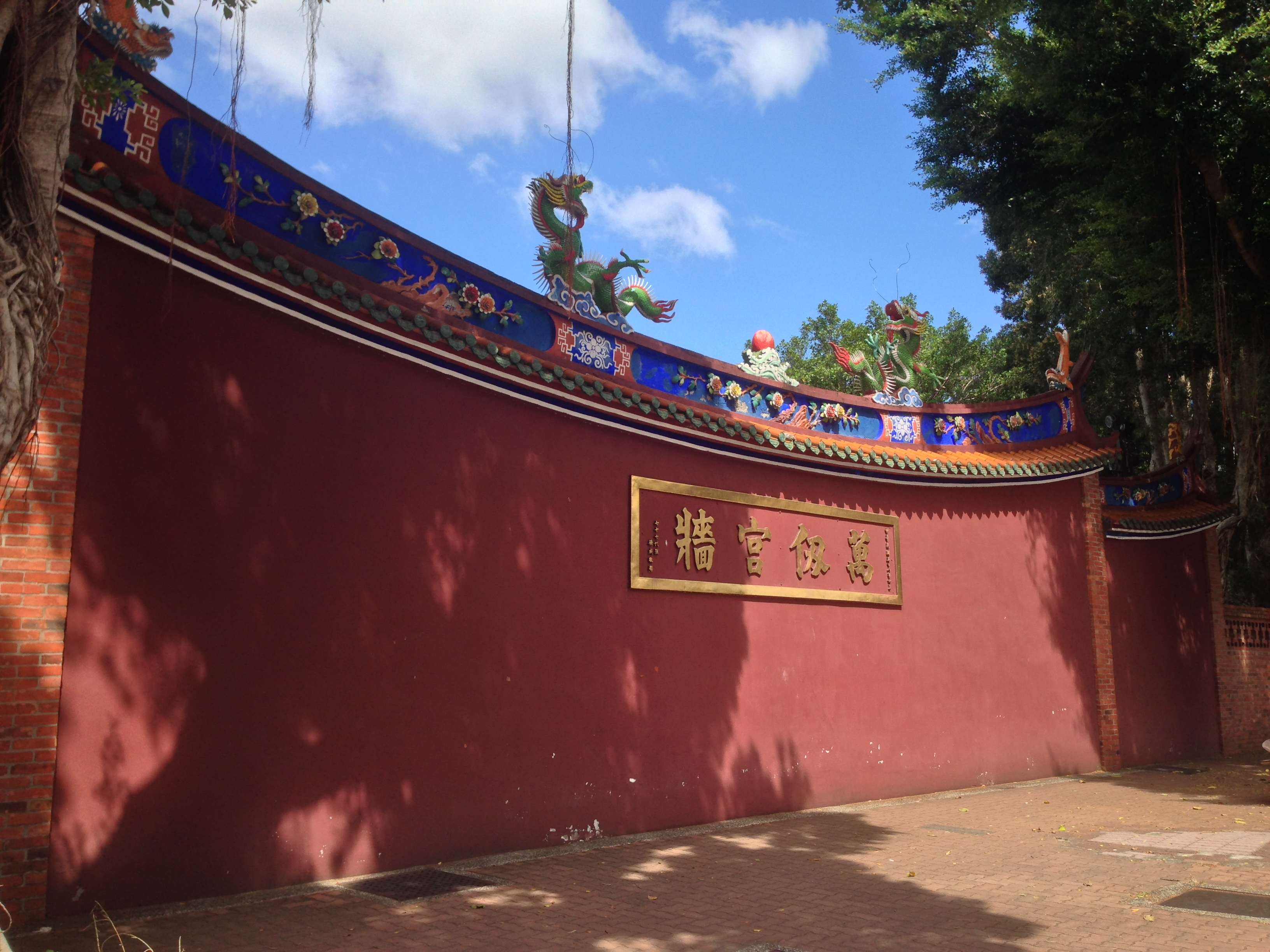 中文（台灣）: 台北孔子廟萬仞宮牆